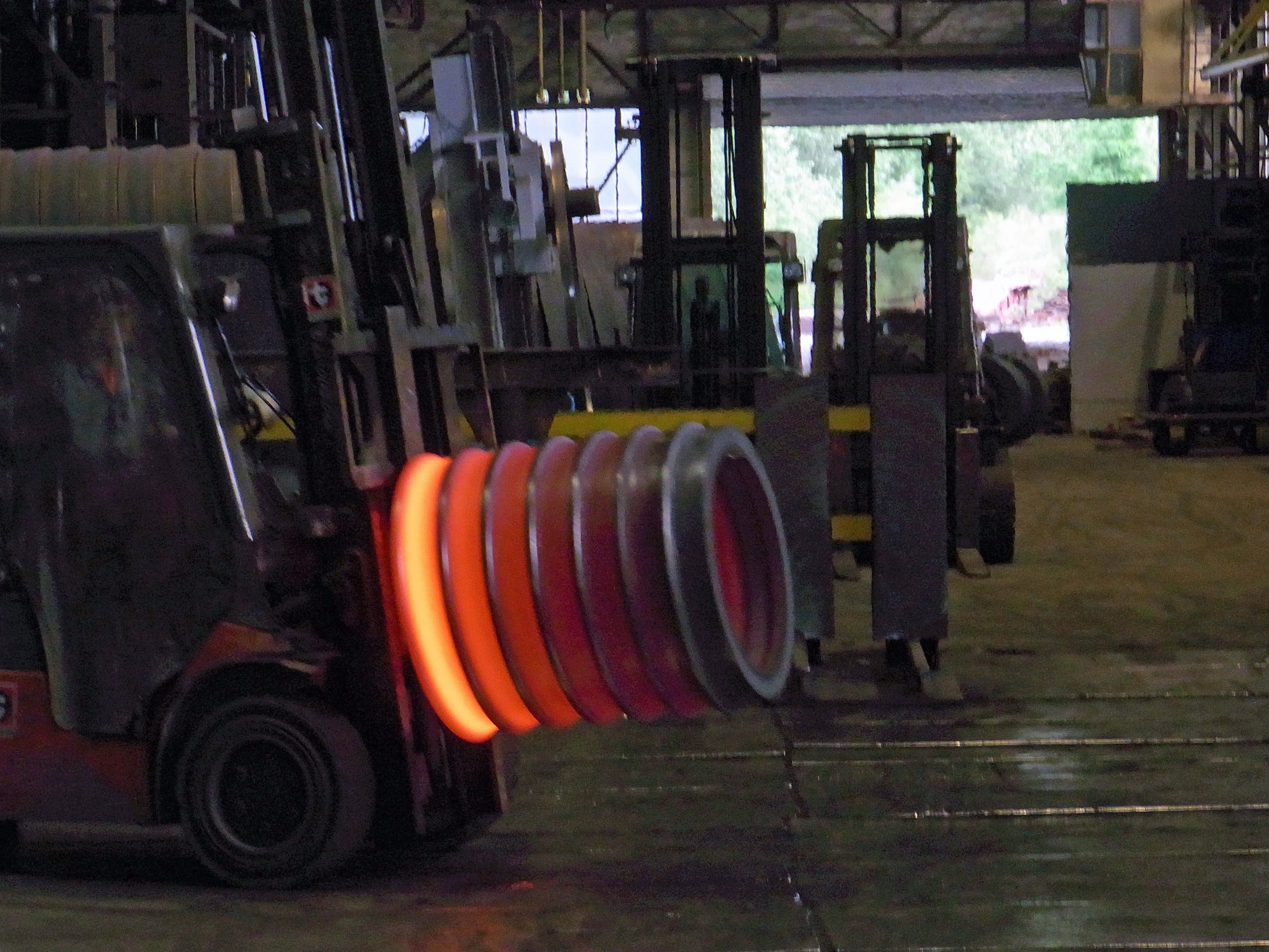 ExtraSchicht 2010, Radreifenproduktion im Bochumer Verein